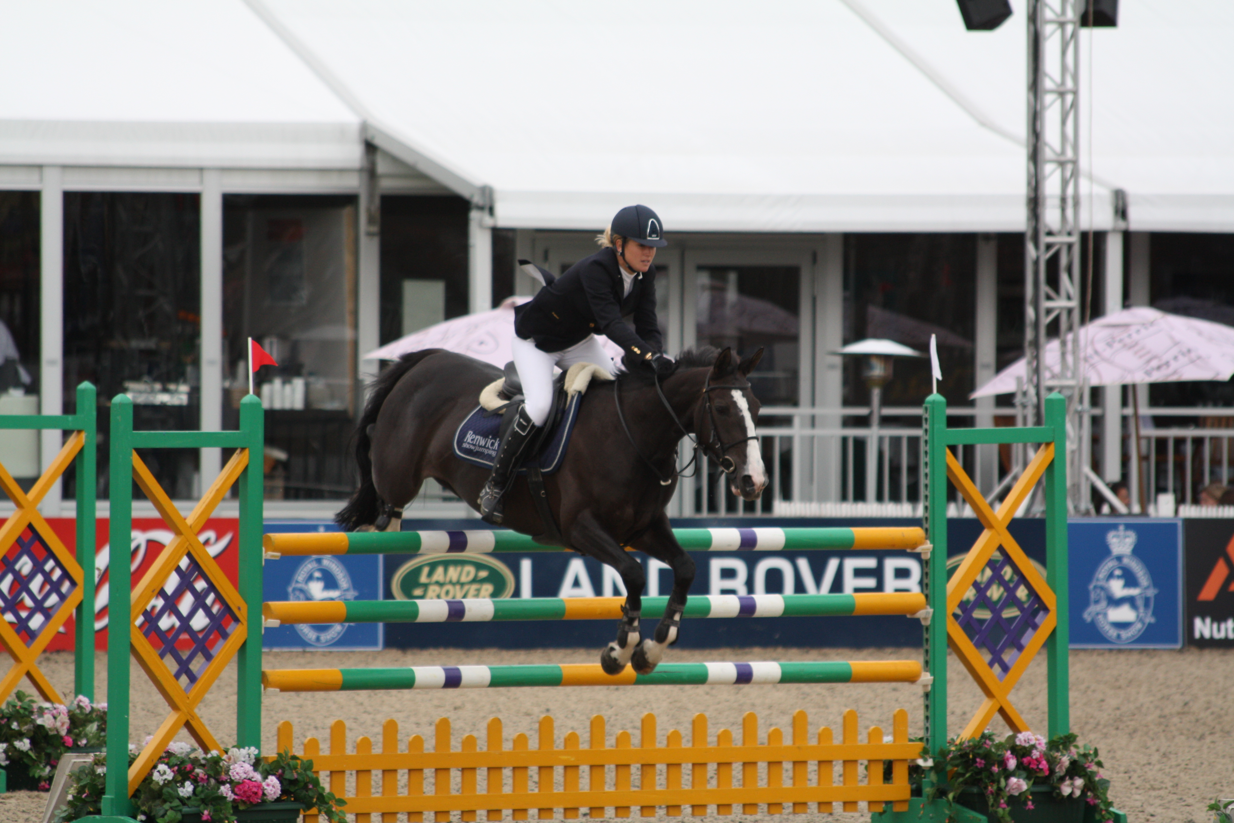 Laura Renwick riding Limelight De Breve